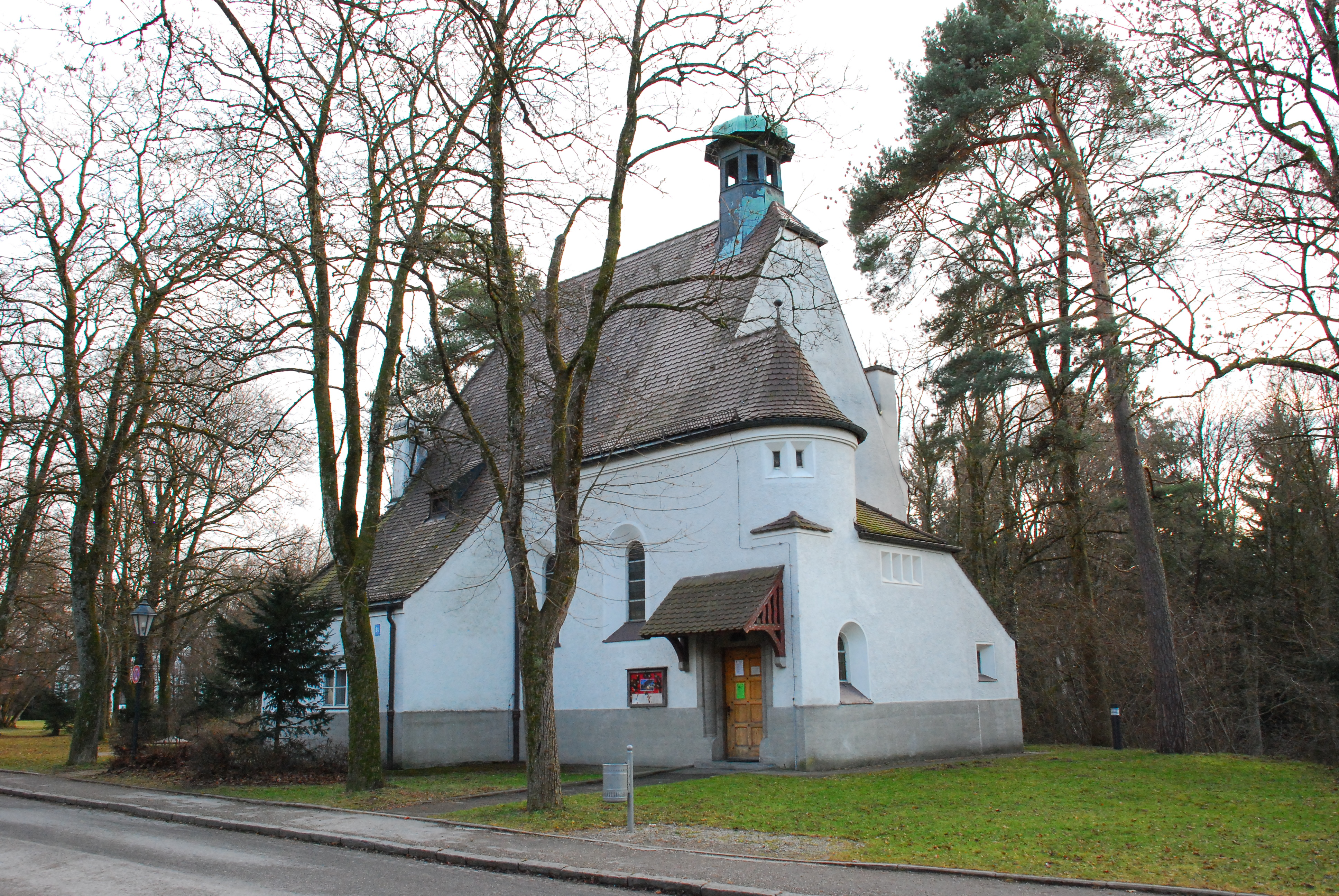 Evangelische Jesuskirche auf dem Gelände des Isar-Amper-Klinikums München-Ost in Haar, Landkreis München, Regierungsbezirk Oberbayern, Bayern. Als Baudenkmal unter Aktennummer D-1-84-123-9 in der Bayerischen Denkmalliste aufgeführt. Erbaut im Jahr 1905.